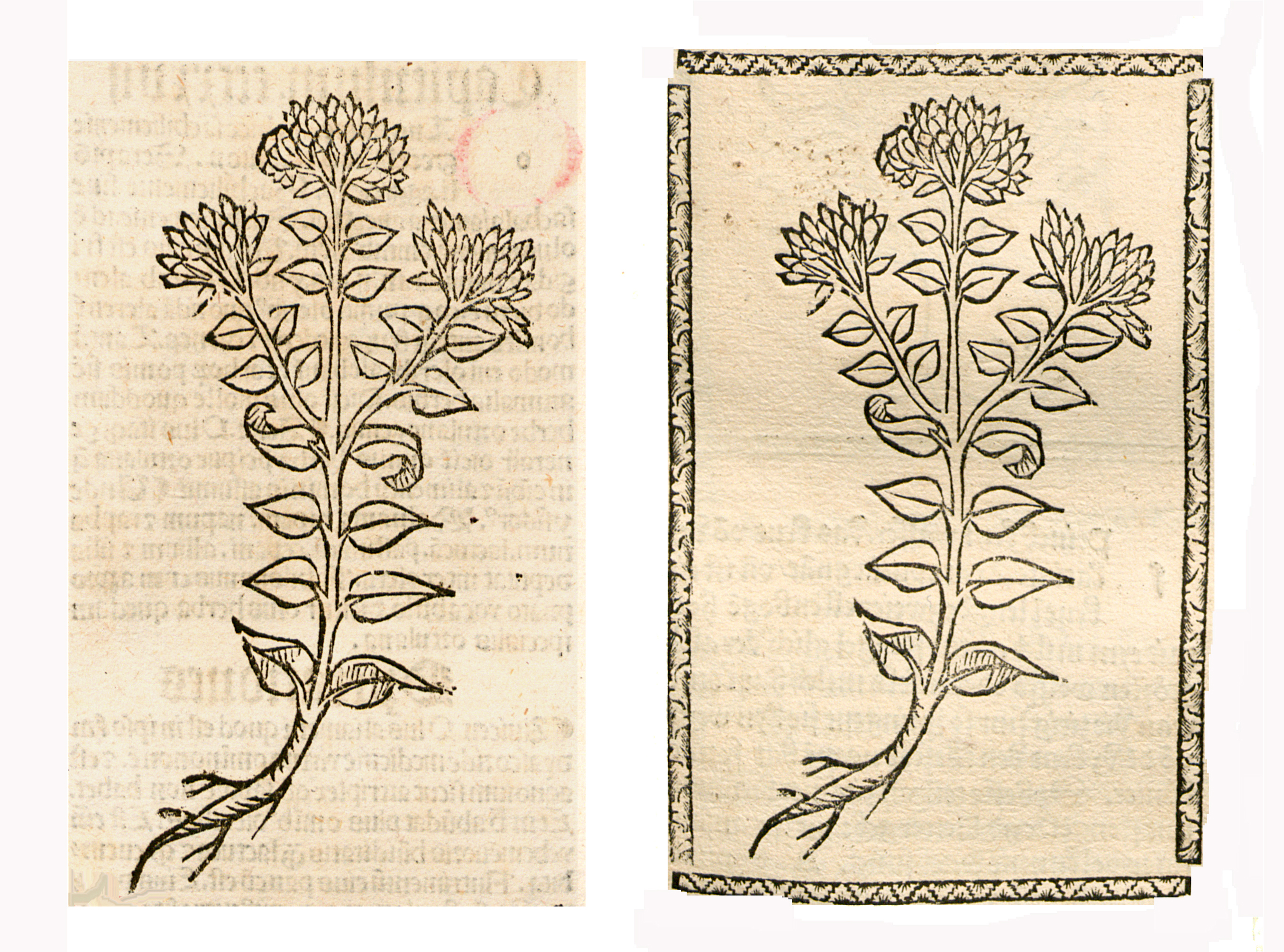 Abbildung vonː Tosten (Origanum vulgare)